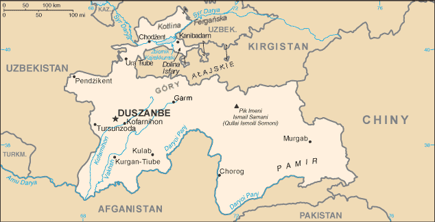 Mapa Tadżykistanu, wersja polska, CIA World Factbook